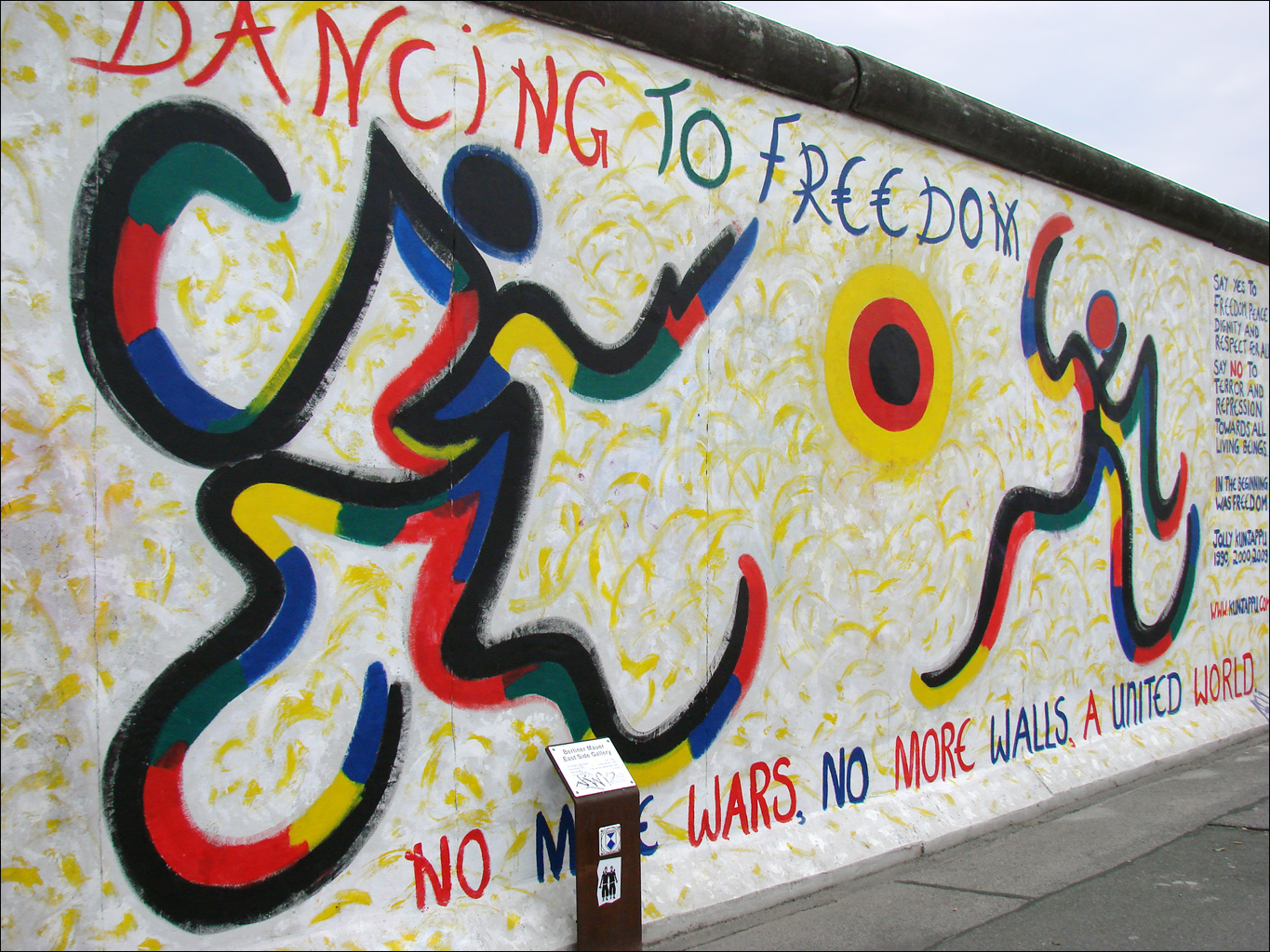 Oeuvre sur East Side Gallery East-Side-Gallery est un tronçon du mur de Berlin parallèle à la Spree et à la Mühlenstrasse qui a été peint par de nombreux artistes internationaux en 1990 sur le thème de la Paix et de la Réconciliation. Le site a été classé aux monuments historiques. Il a été restauré en 2009 à cause du vandalisme mais de nouveaux graffiti ont été à nouveau inscrits sur la plupart des oeuvres. Article de Wikipedia site officiel